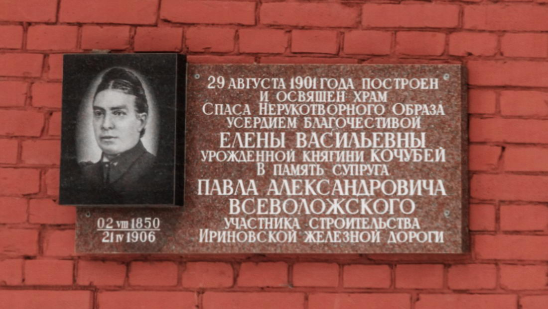 Мемориальная доска на храме Спаса Нерукотворного Образа на Дороге жизни. (В тексте присутствует ошибка: вместо «урождённой княжны Кочубей», написано — «урождённой княгини Кочубей».)